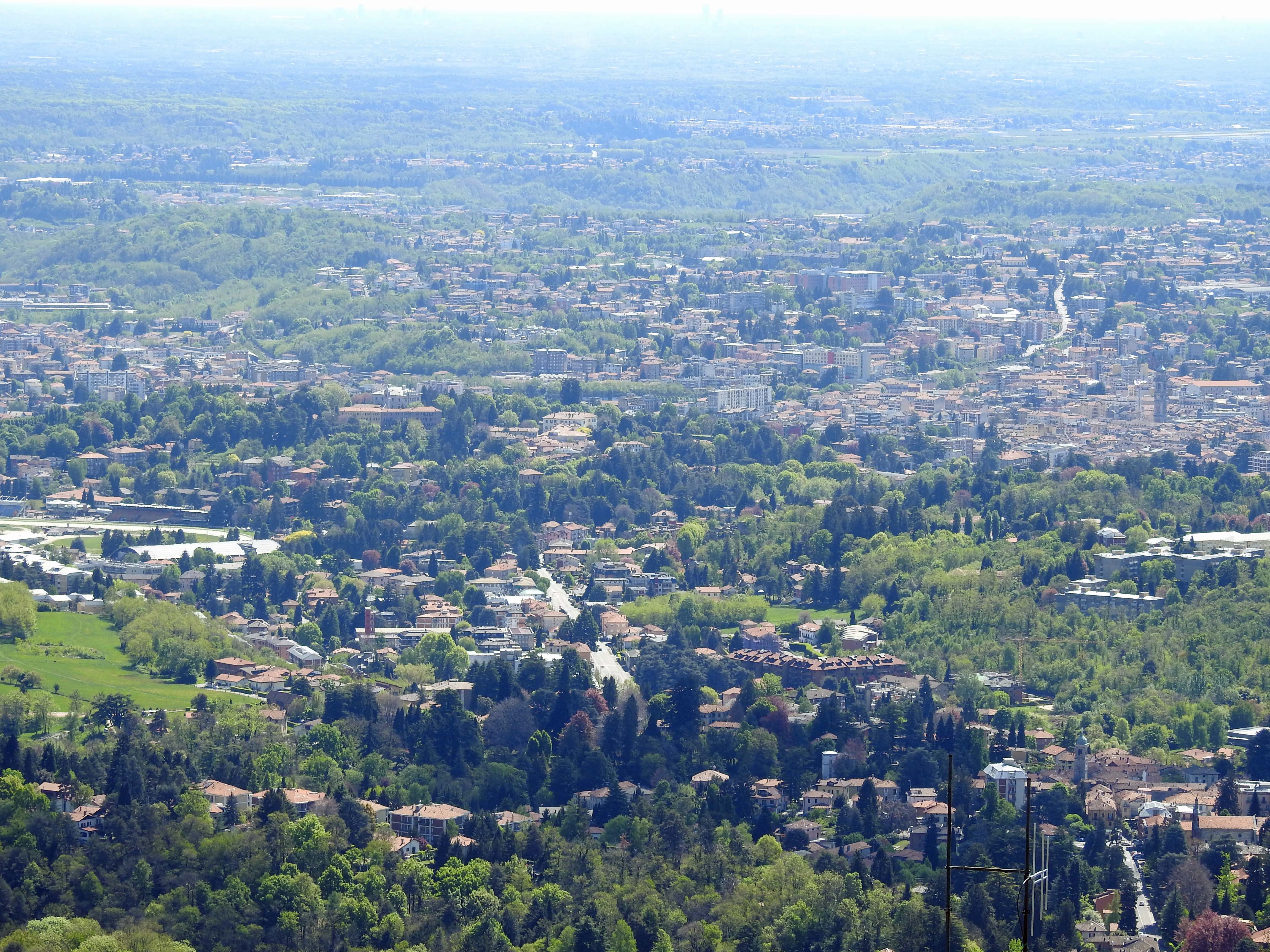 Varese von Norden